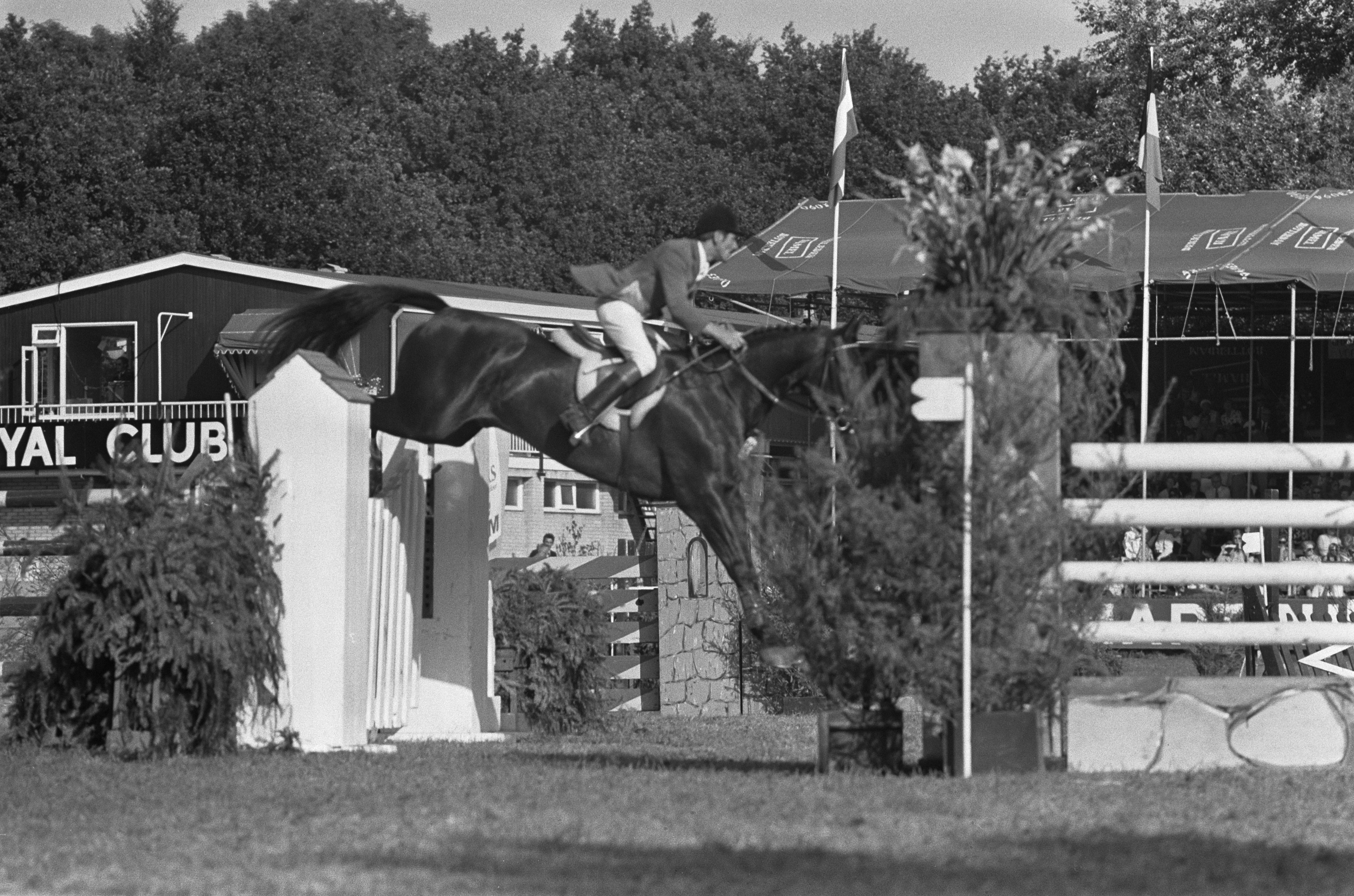 Collectie / Archief : Fotocollectie Anefo Reportage / Serie : [ onbekend ] Beschrijving : CHIO te Rotterdam, Grote Prijs van Rotterdam, H. Steenken (West-Duitsland) in aktie met Kosmos Datum : 26 augustus 1973 Locatie : Rotterdam, Zuid-Holland Trefwoorden : concoursen, paarden, ruiters Persoonsnaam : H. Steenken Instellingsnaam : CHIO Fotograaf : Mieremet, Rob / Anefo Auteursrechthebbende : Nationaal Archief Materiaalsoort : Negatief (zwart/wit) Nummer archiefinventaris : bekijk toegang 2.24.01.05 Bestanddeelnummer : 926-6377